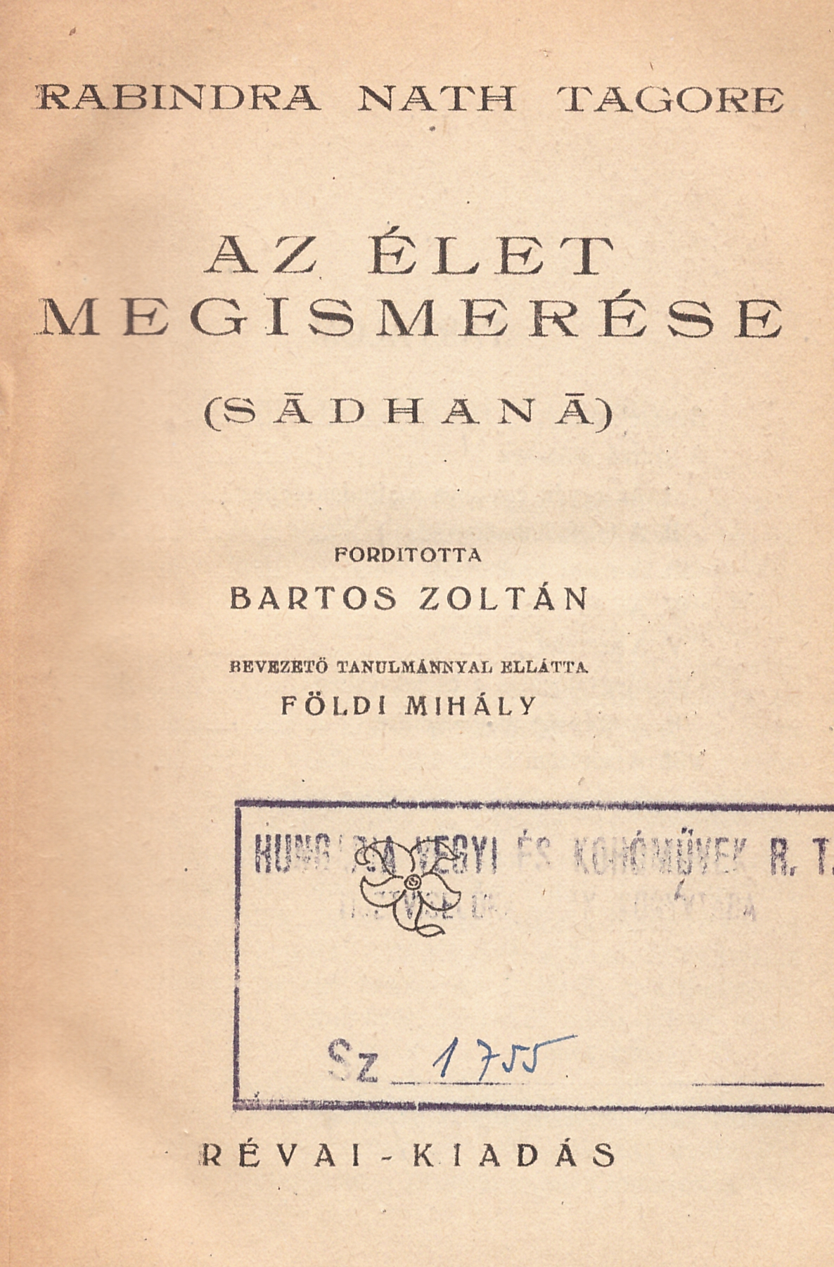 Rabindranáth Tagore (1861-1941): Az élet megismeré­se (Sadhana). (Évszám nélkül, feltehetően 1920/1930-as évek).